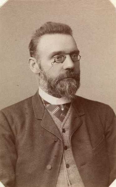 Politikeren og skolemannen Paul Steenstrup Koht.